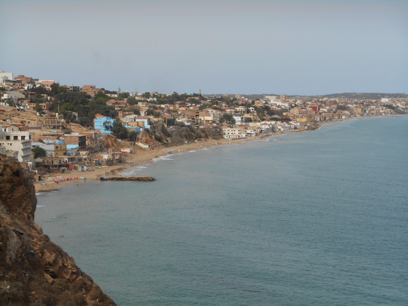 Ain el Turc quartiers Saint-Roch, Trouville et Bouisseville